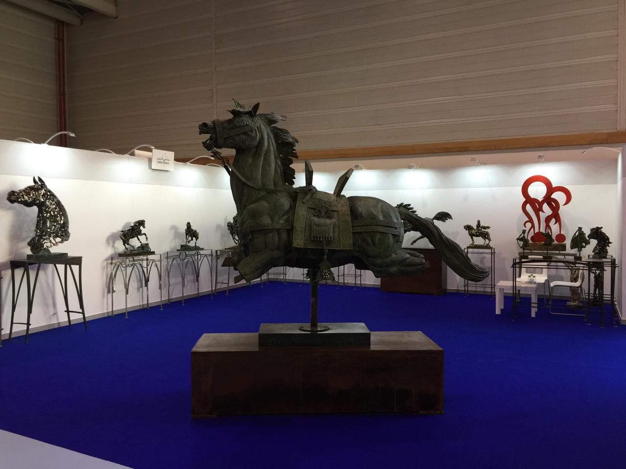 salon du cheval d'al Jedida, Maroc 2018